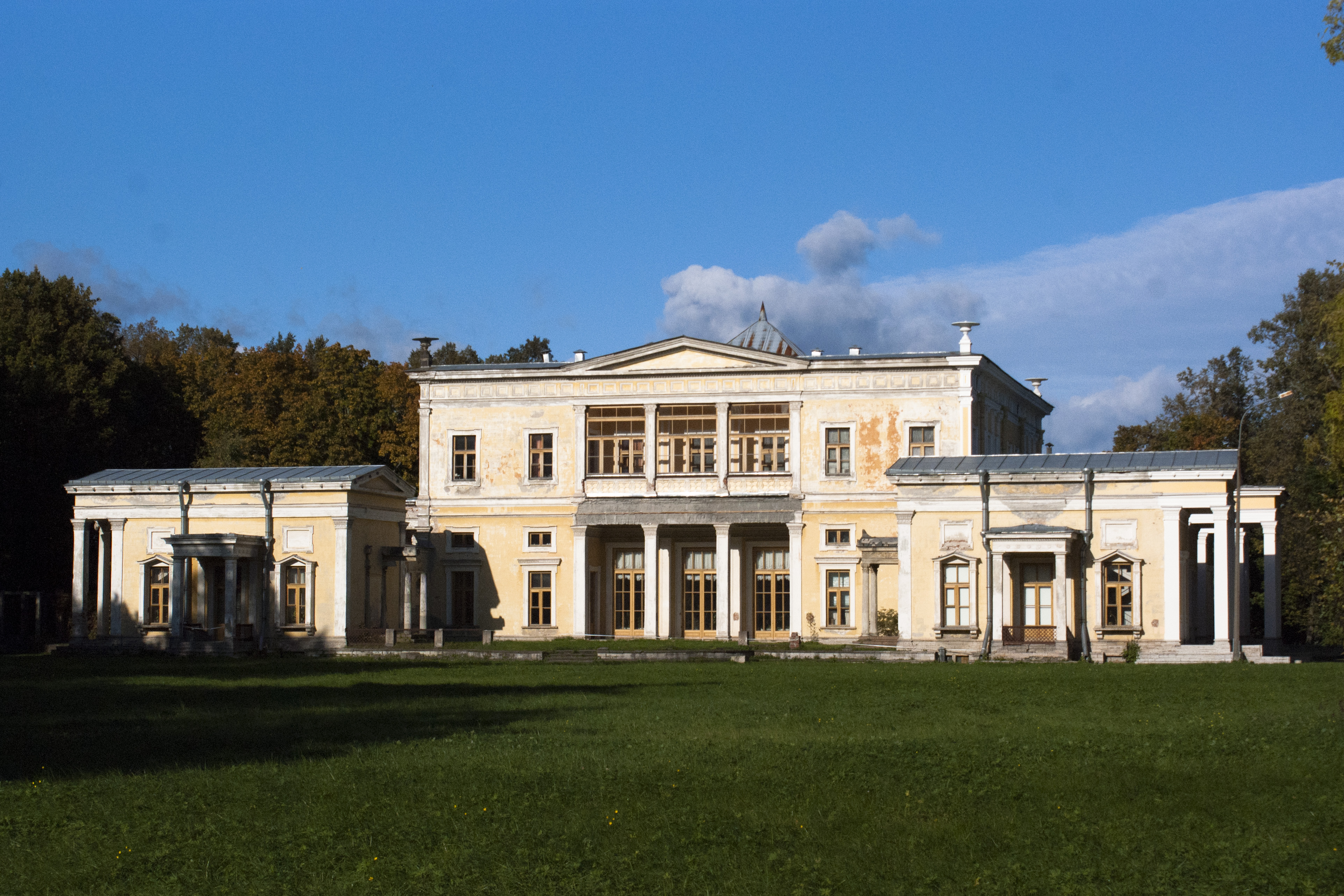 Дворцово-парковый ансамбль Сергиевка